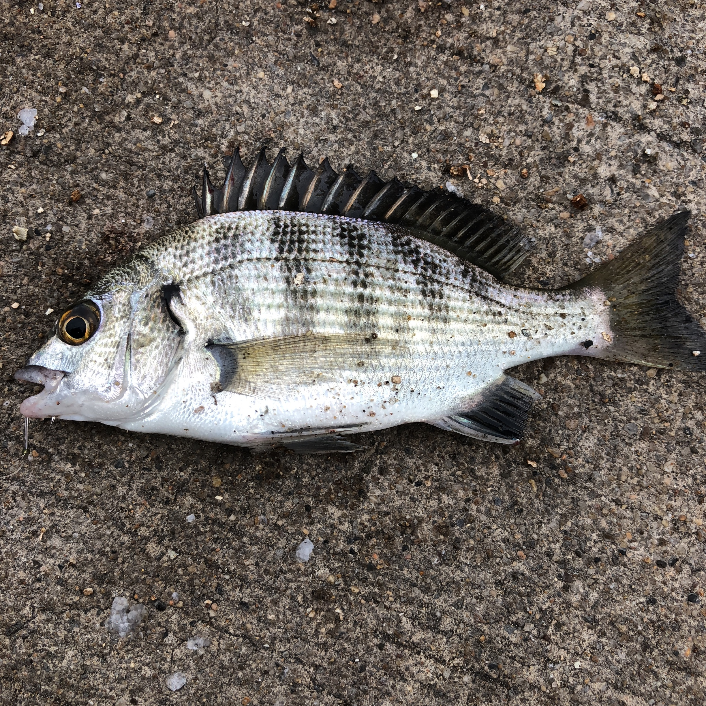 クロダイ 2018.9.4 鹿島港